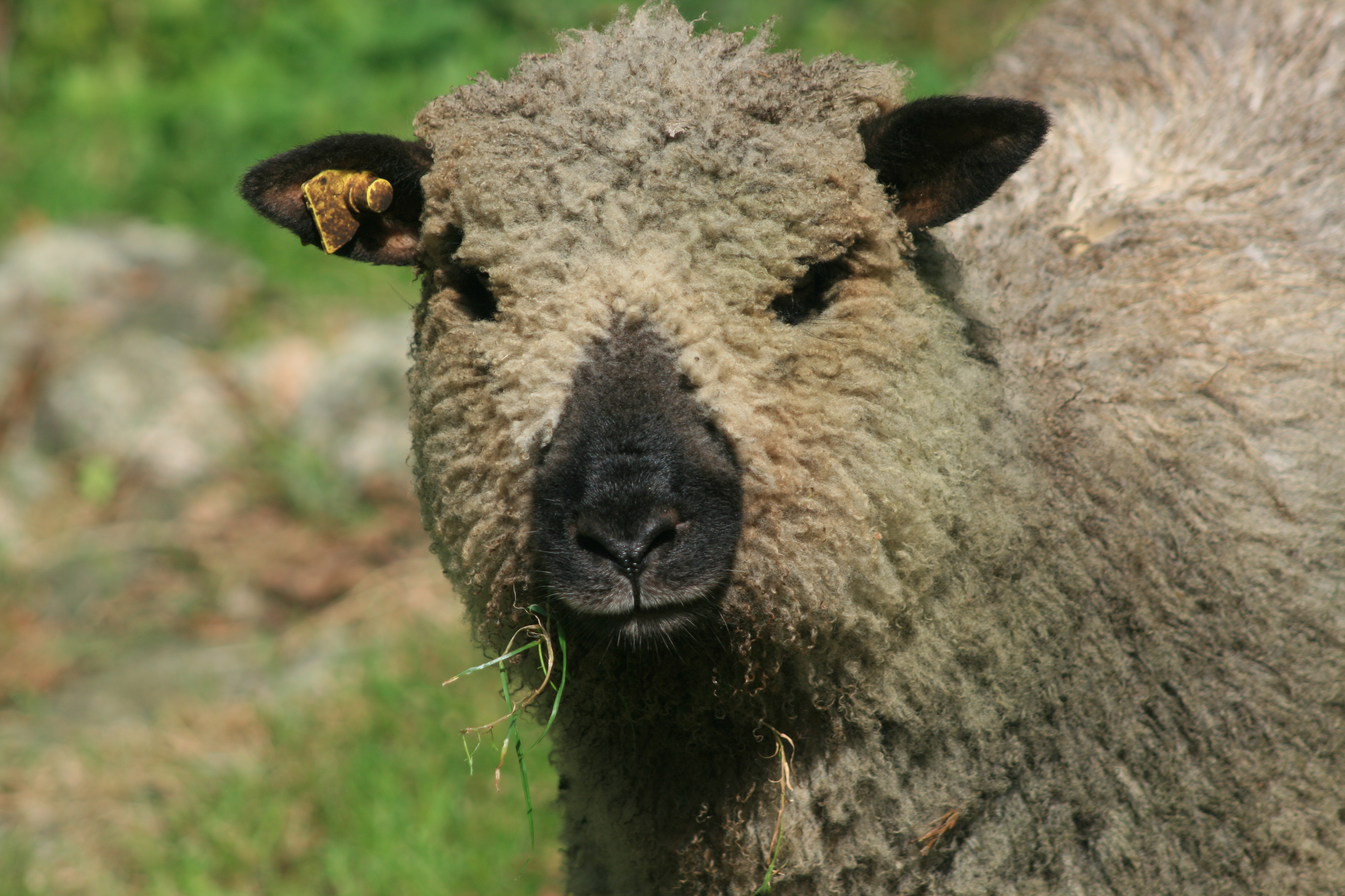 Kopf eines Shropshire-Schafes